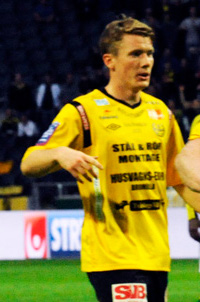 Viktor Agardius